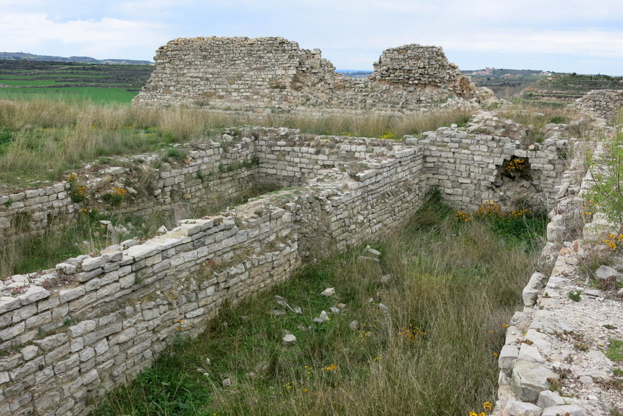 Castell de Cervera (Segarra) - Catalunya